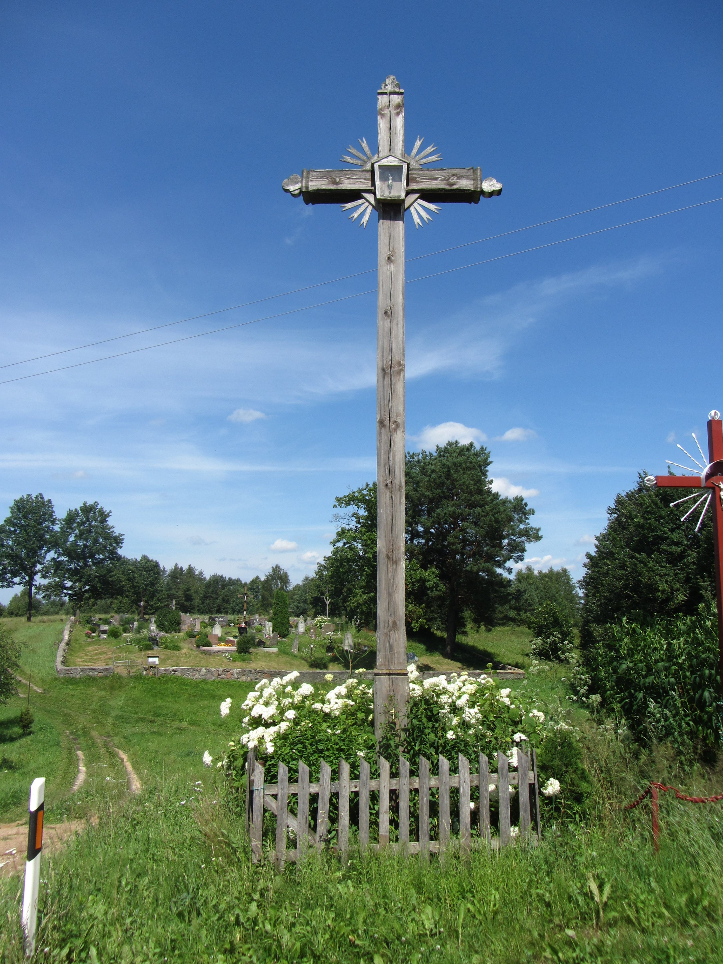 Voriškės, Lithuania